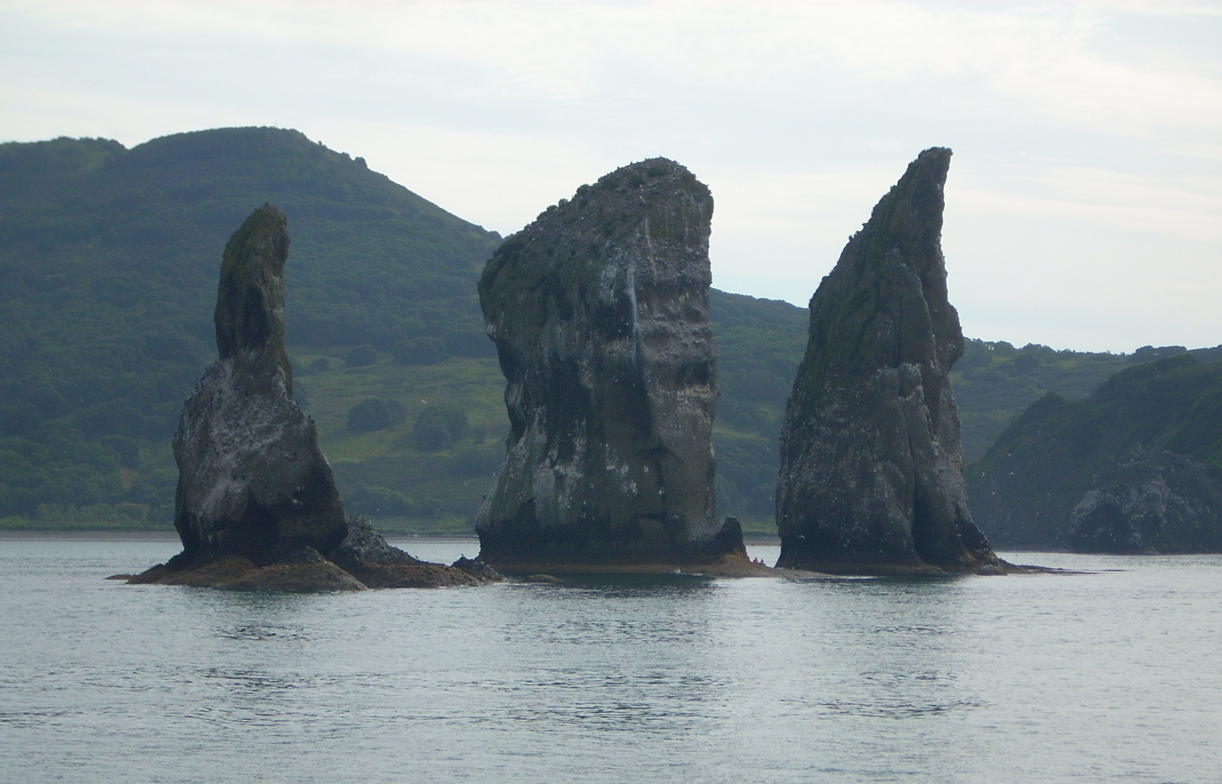 скалы Три Брата в Авачинской бухте, п-ов Камчатка